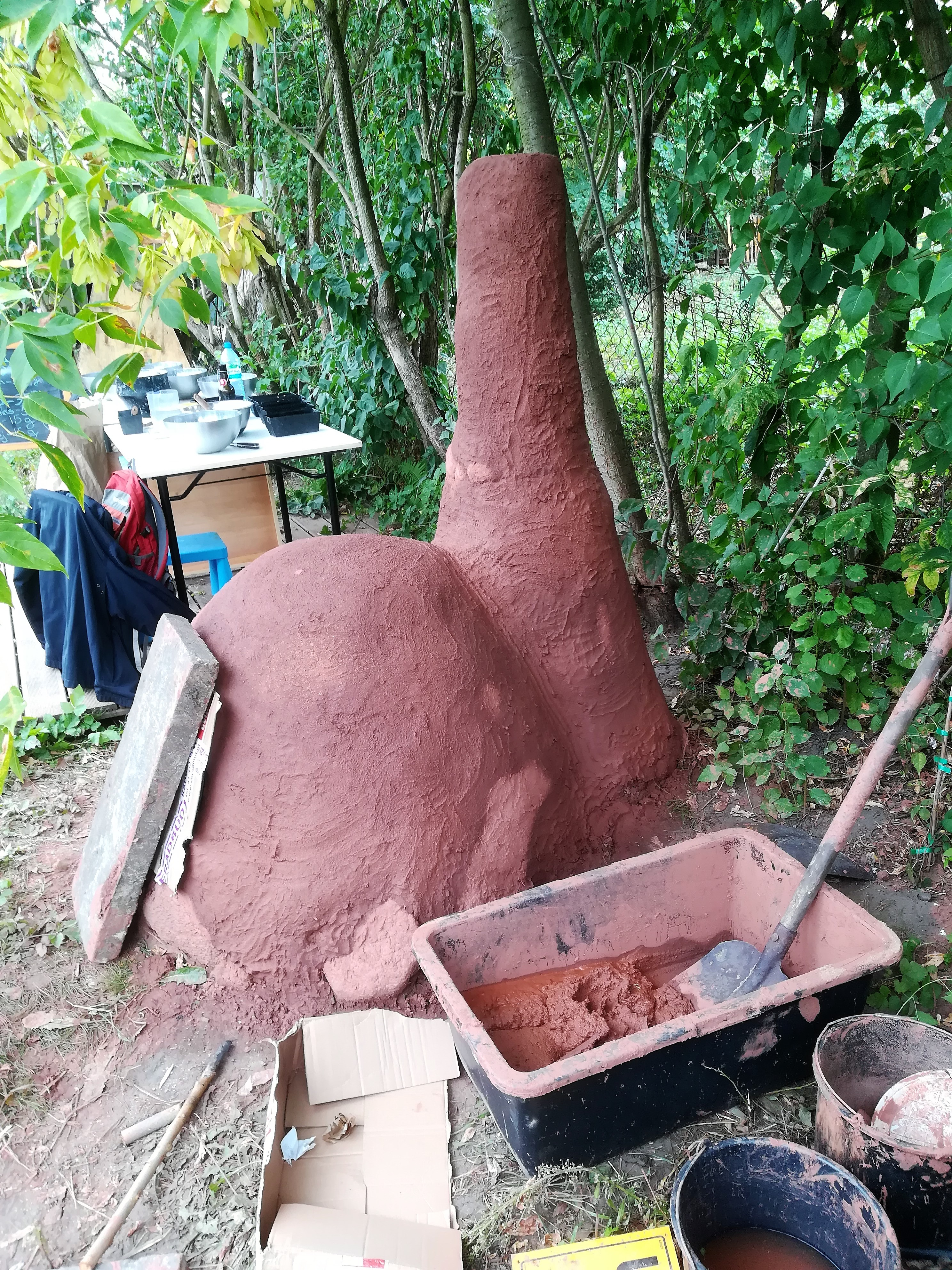 Wypiek chleba w społecznym Ogrodzie Szeląg w Poznaniu. Wykańczanie pieca chlebowego, i proces wypieku.